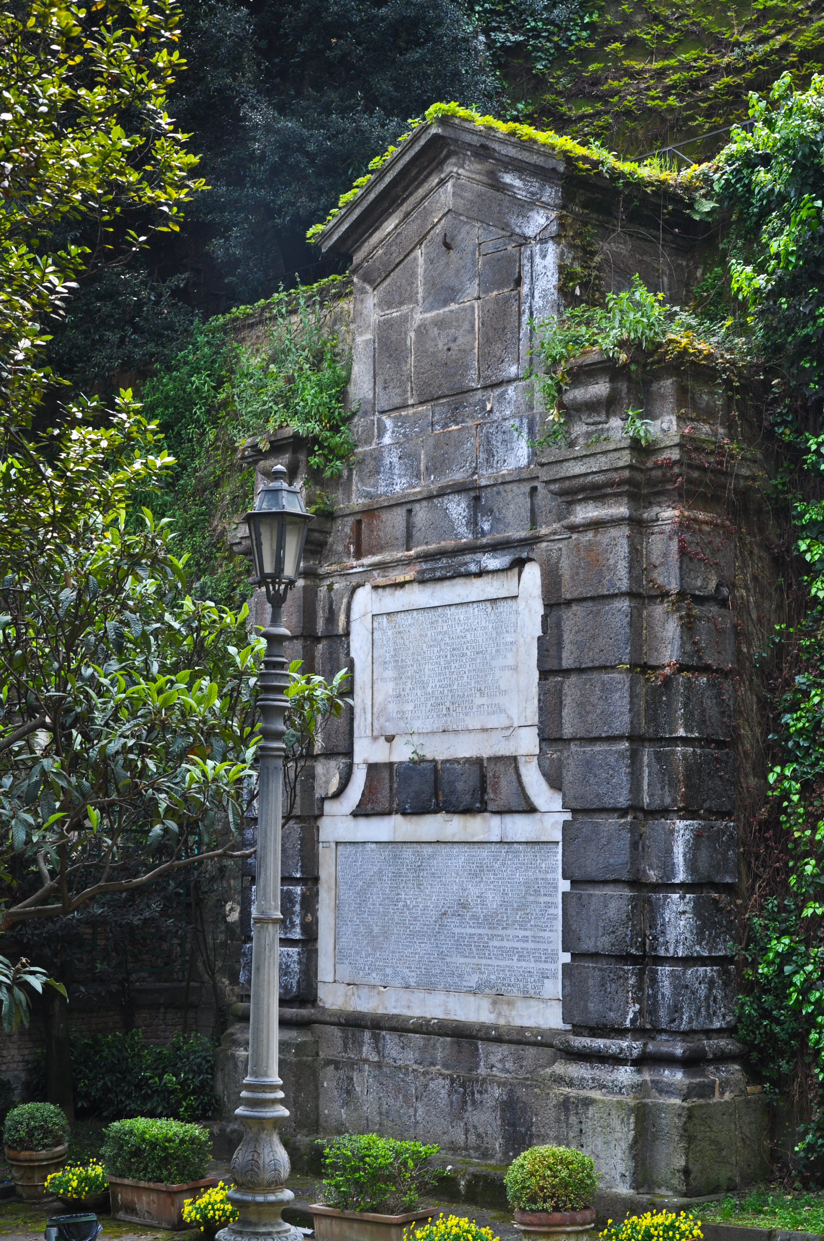 Edicola al parco Vergiliano (Napoli)